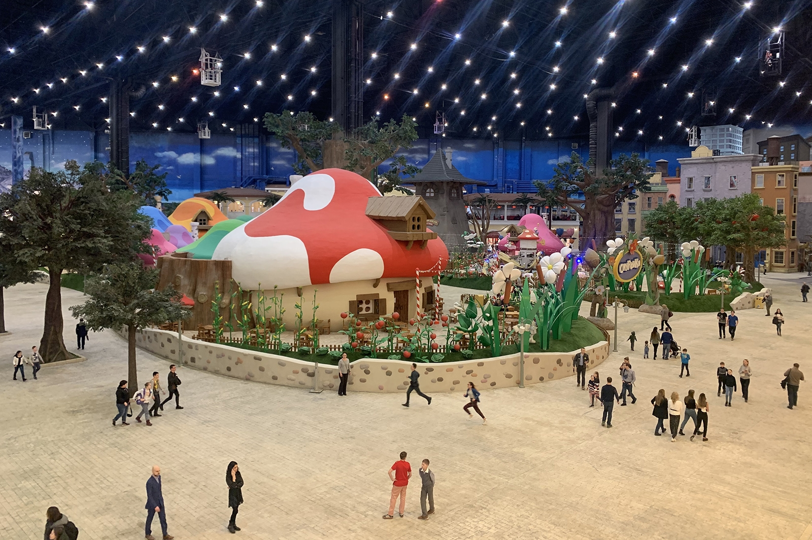 Президент РФ Владимир Путин и мэр Москвы Сергей Собянин открыли тематический парк развлечений «Остров Мечты» в Нагатинской пойме.